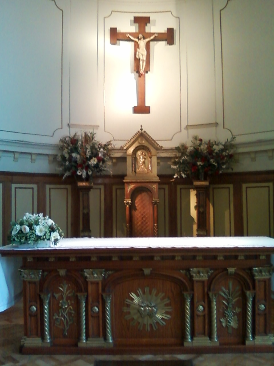 Sepulcro de Mons. Carlos Casanueva Opazo.